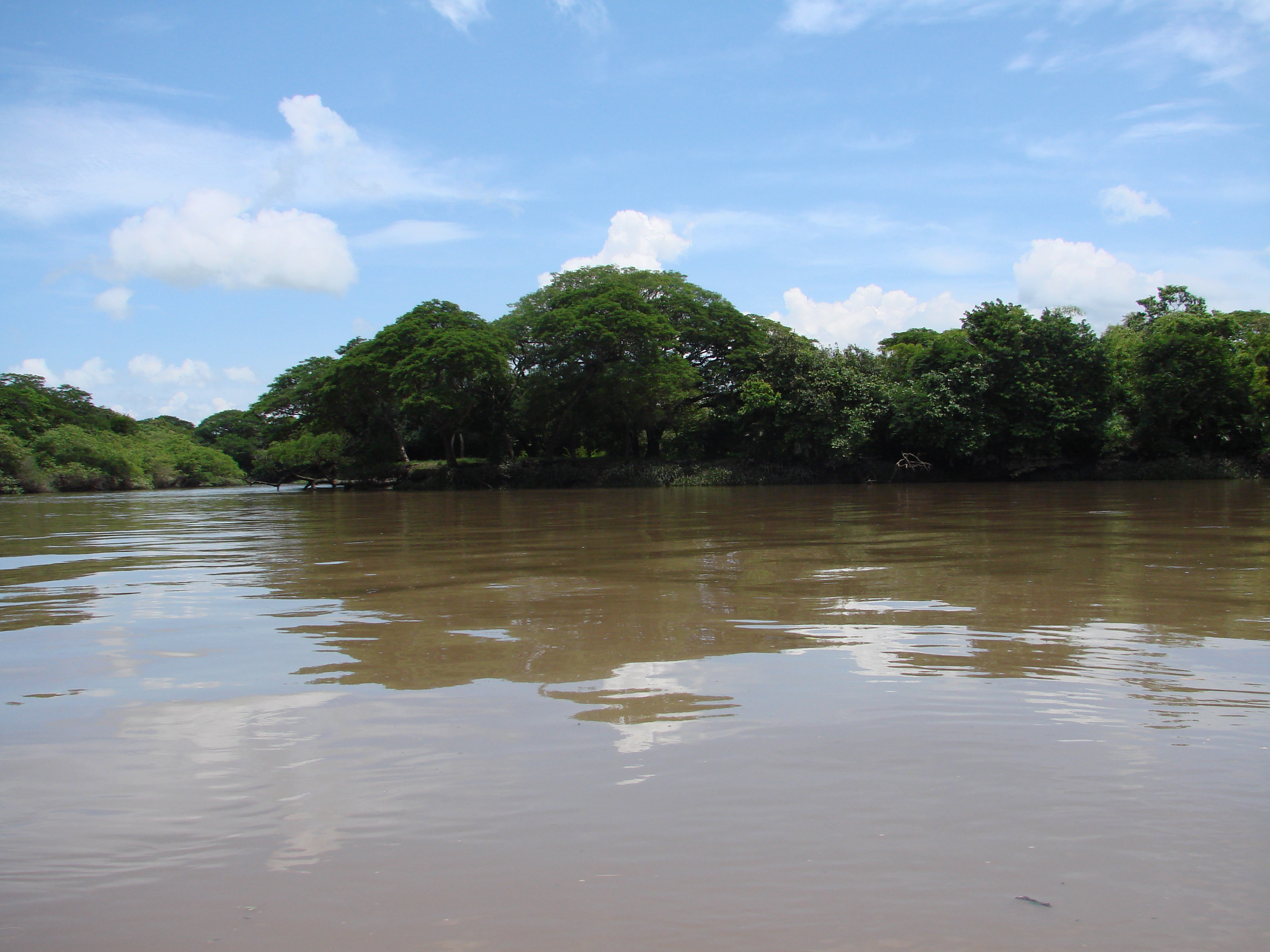 Il fiume Tempisque nei pressi di Bolsón. Río Tempisque, Bolsón, Guanacaste, Costa Rica. Tempisque River @ Bolsón, Costa Rica